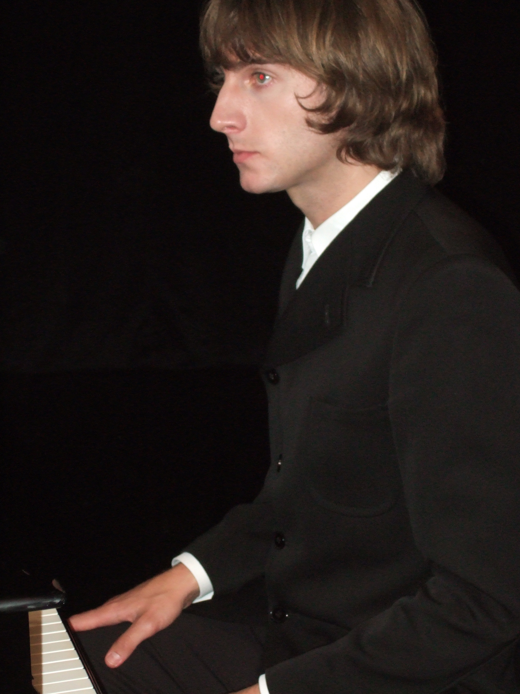 Maximilan Hecker